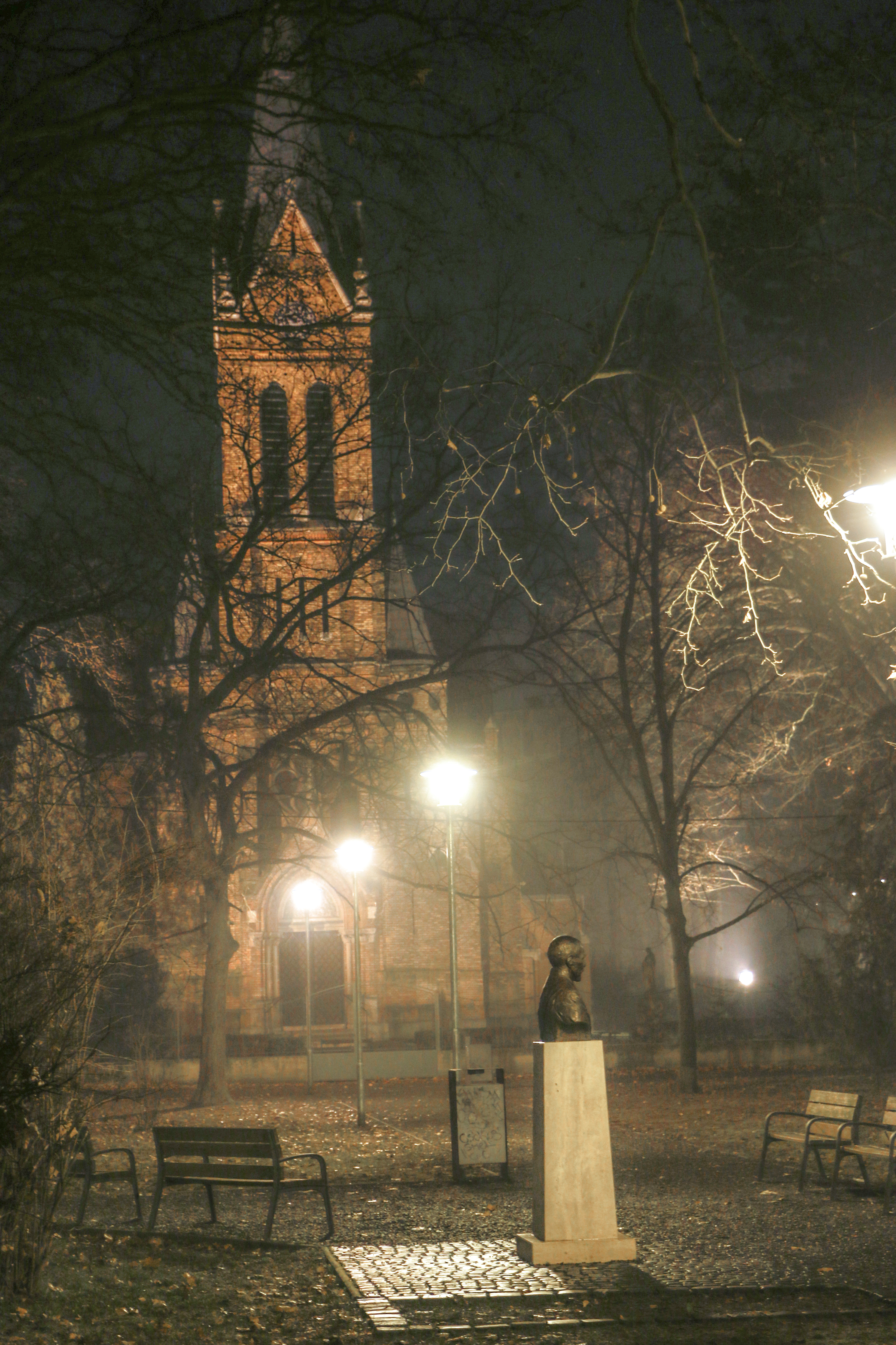 A mátyásföldi Szent József Plébánia felszentelésére 1985. augusztus 25-én került sor. Védőszentje eredetileg Kalazanci Szent József, 1964. október 3-tól a munkás Szent József. A Templomépítő Bizottság elnöke Paulheim József volt, az ő nevét viseli a plébánia előtti tér. A templom az 1993-as egyházmegyei határrendezés során került a váci egyházmegyétől az esztergom-budapesti főegyházmegyéhez.